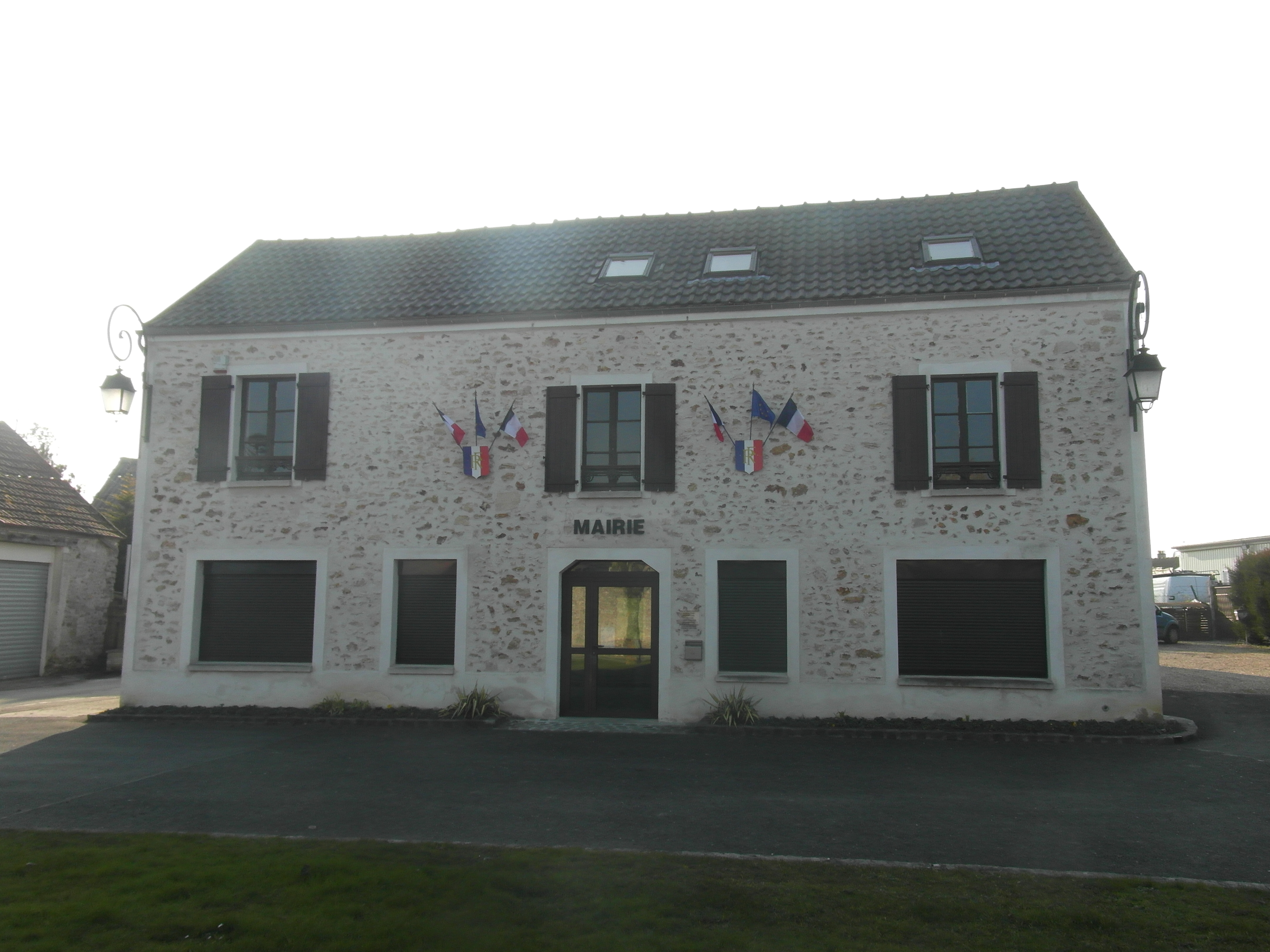 Mairie de Limoges-Fourches (Seine-et-Marne)